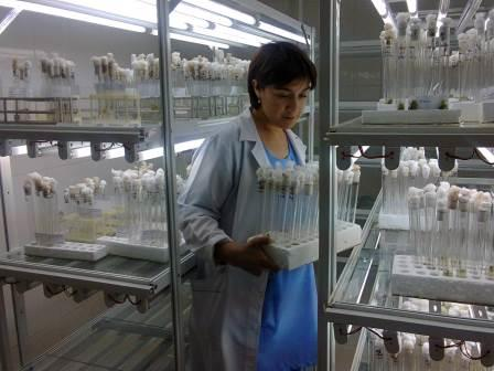 Биотехнологический центр Таджикского национального университета (2013 год)